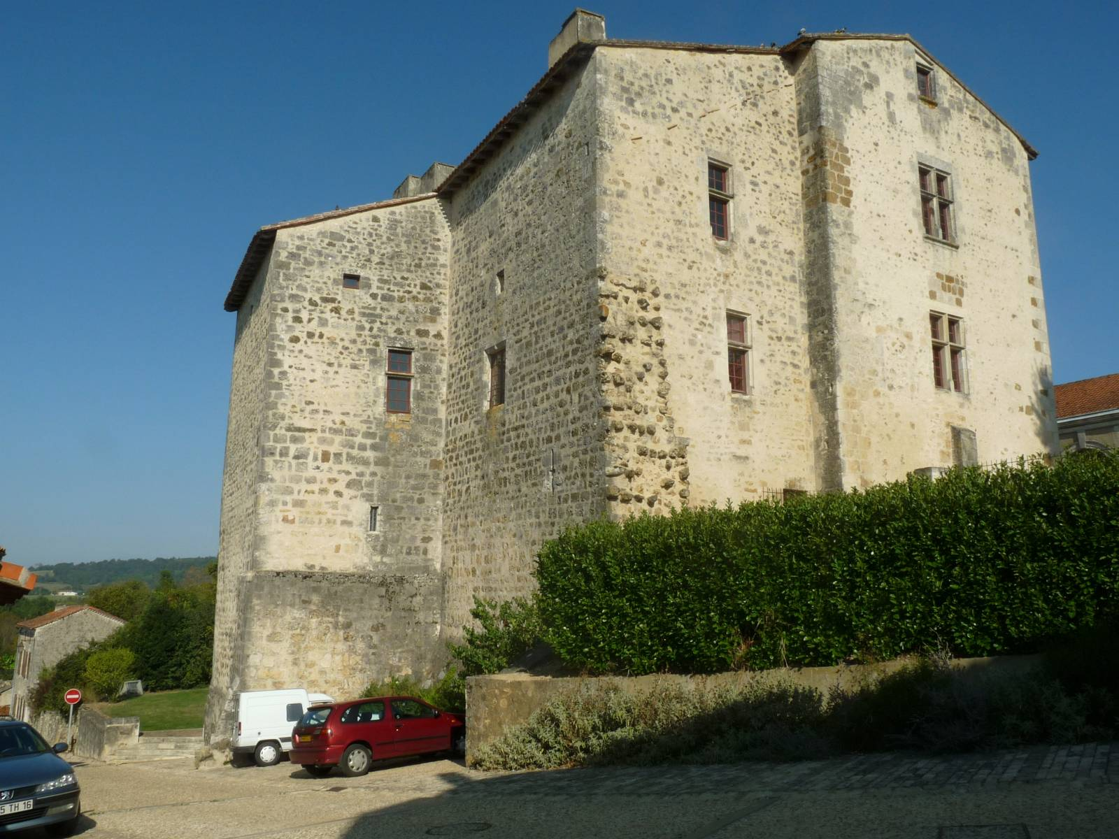 château de Montbron (16), France